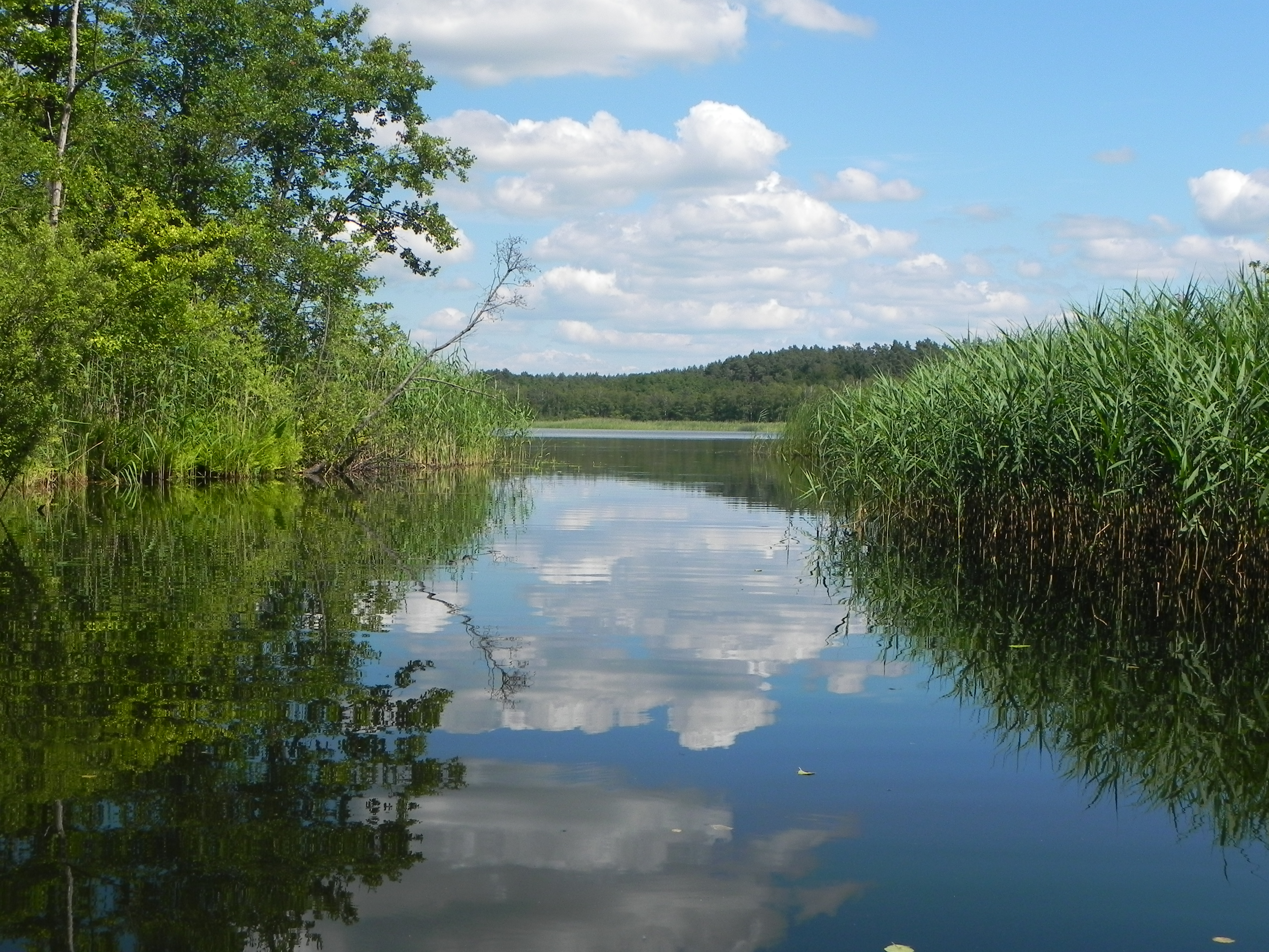 Landschaftsschutzgebiet „Neustrelitzer Kleinseenplatte“ (LSG L38) in Mecklenburg-Vorpommern: Die Oberbek kurz vor dem Rätzsee